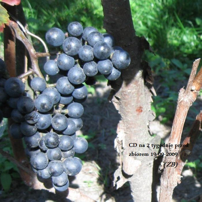 Cabernet Dorsa - grono